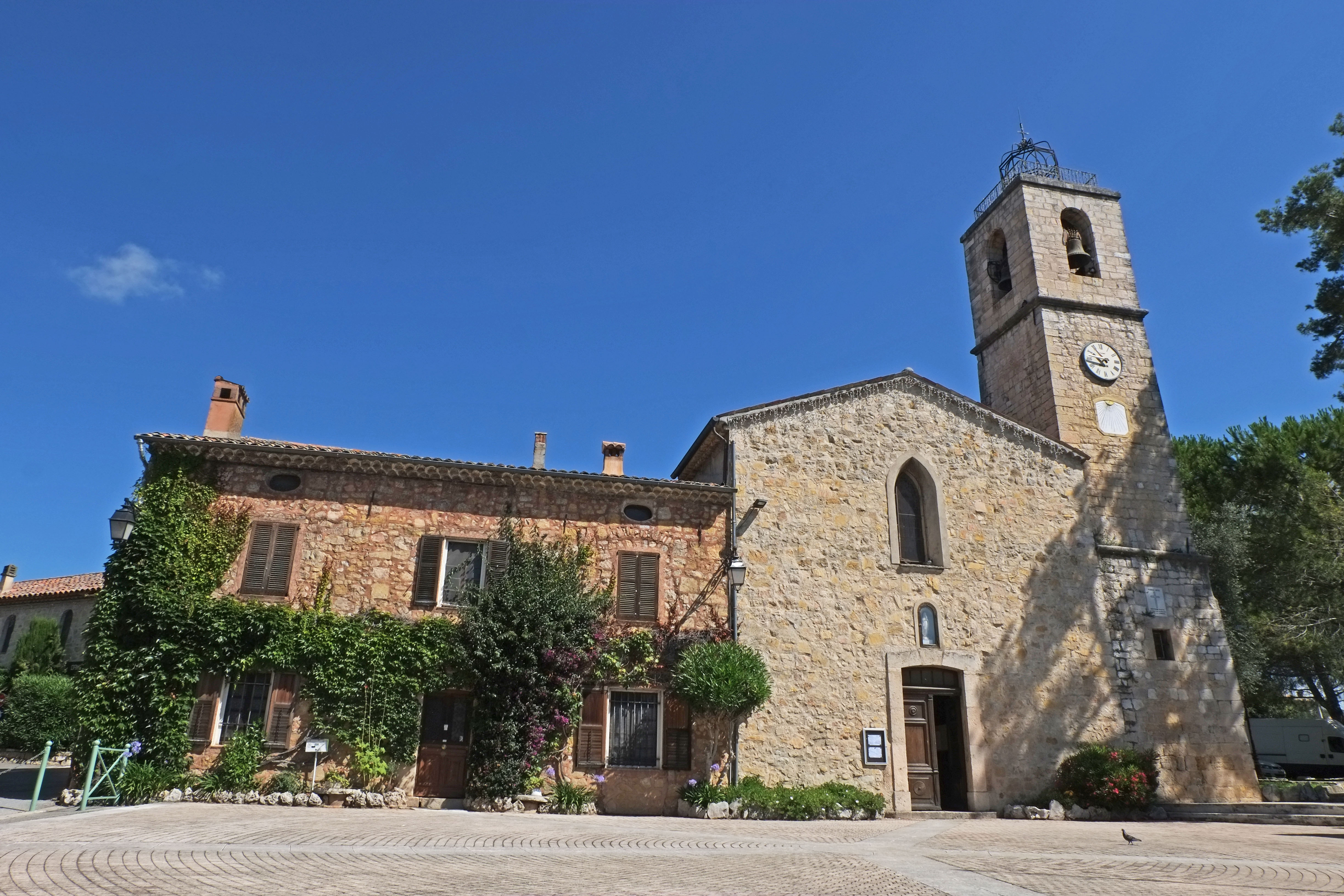 Église du Rouret et maison mitoyenne